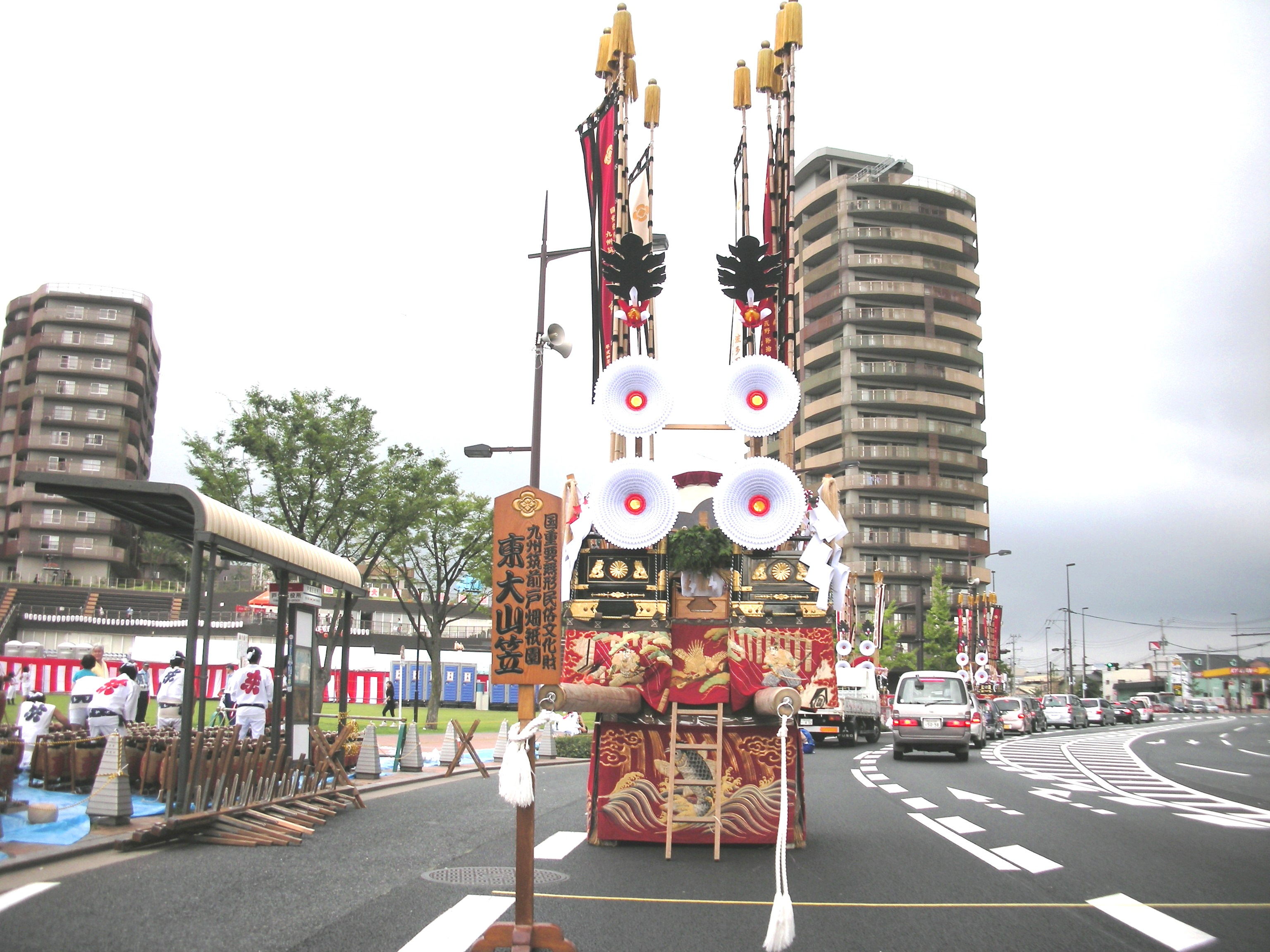 北九州市戸畑区の戸畑祇園大山笠 幟大山笠（東大山笠）